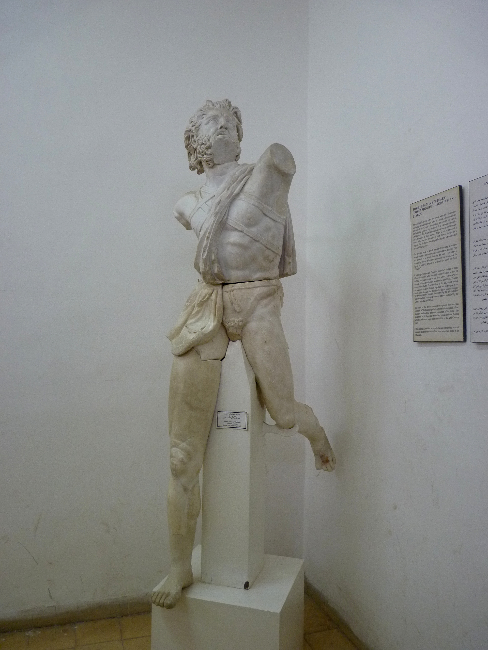 Amman (Jordan)